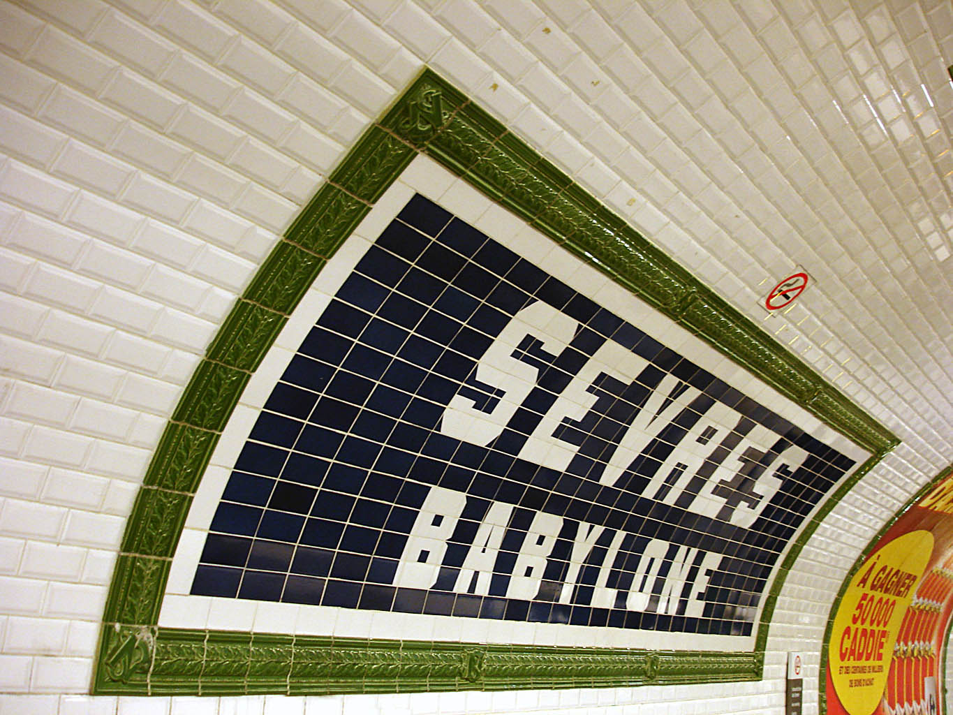 Station Sèvres - Babylone de la ligne 12 du métro de Paris, France.